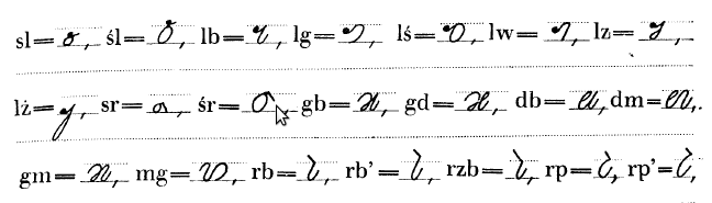 Przykładowe grupy spółgłoskowe systemu stenograficznego Gabelsbergera-Polińskiego